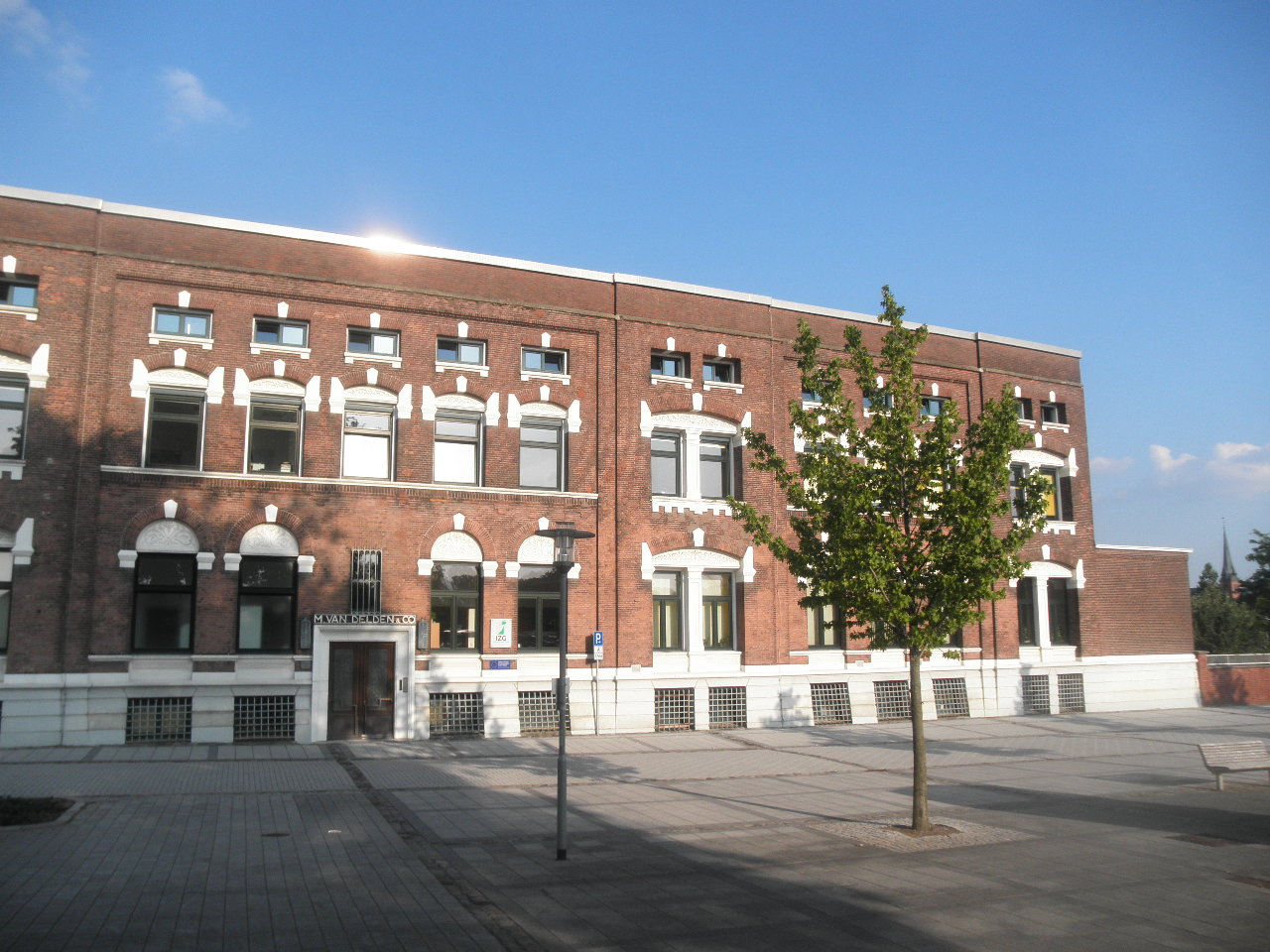 fasado de la eksa teksaĵofabrikejo M. van Delden en Gronau, Vestfalio